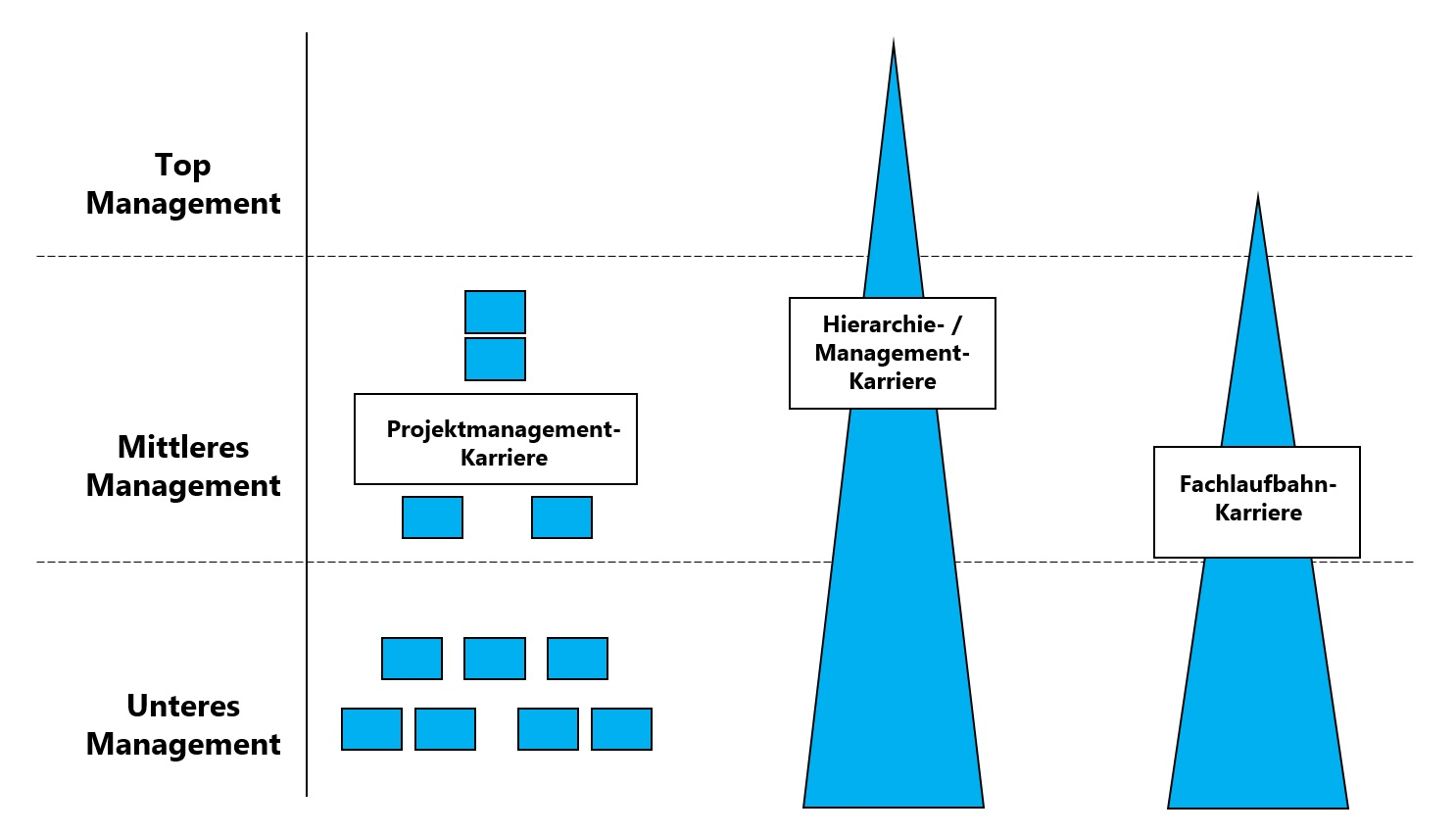 Alternative Karrieresysteme - Die Fachlaufbahn